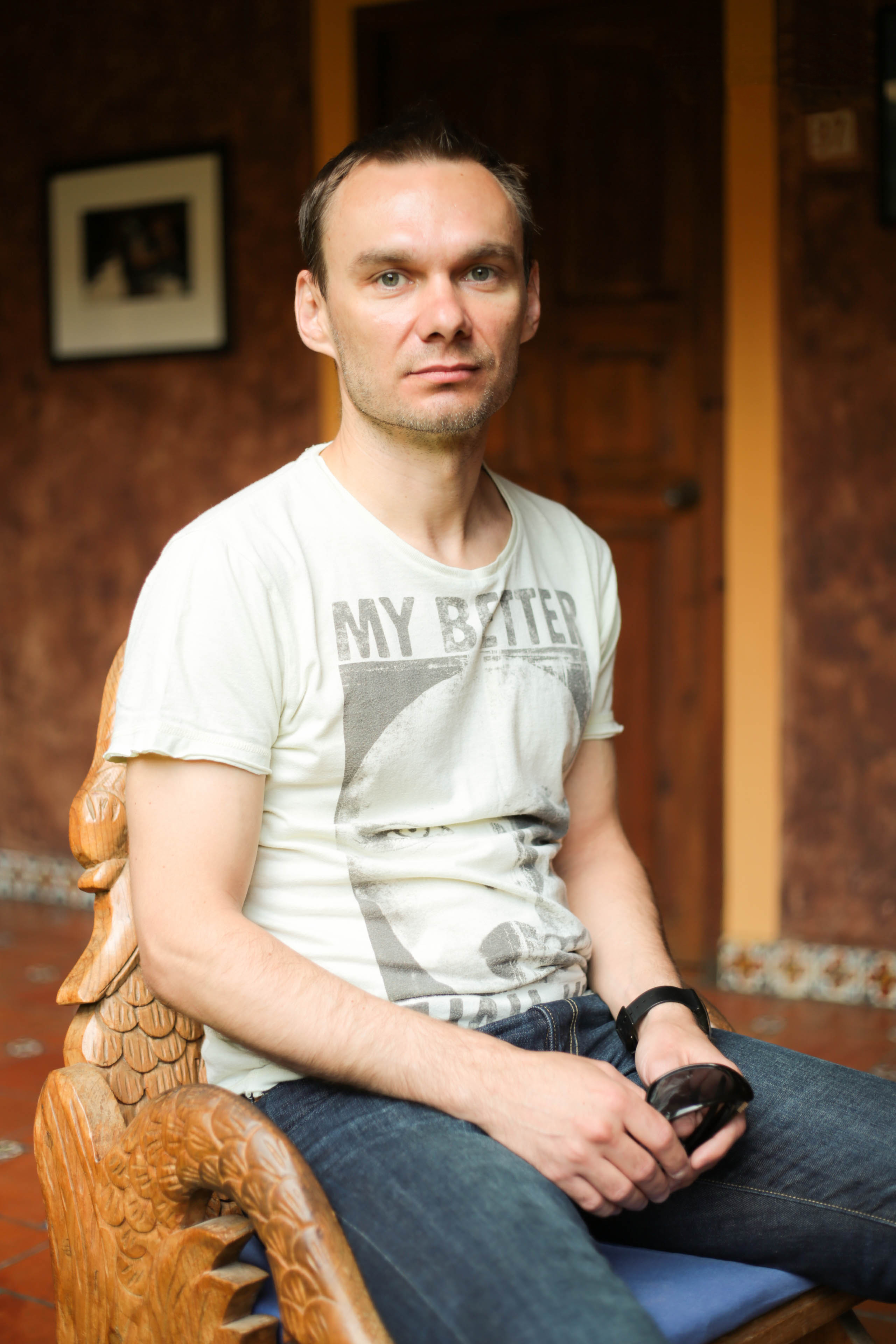 Festival Ambulante. Askold Kurov, uno de los directores del documental: "Invierno, ¡lárgate!". Hotel Casa Mexicana. San Cristóbal de las Casas, Chiapas. 27 de abril. Foto: Delia Martínez.